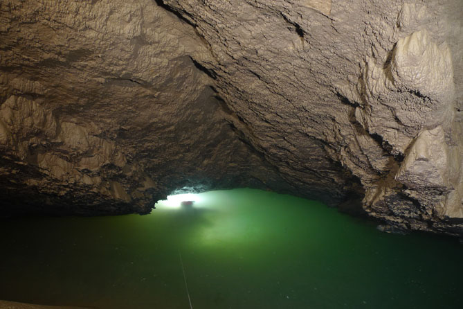 Urgitxi (Gizaburuaga), 2010eko martxoaren 27a. ADES Espeleologia Elkarteko urpekariak (Ricardo Gutierrez eta Antonio Garcia) kobako azken sifoia esploratzen.